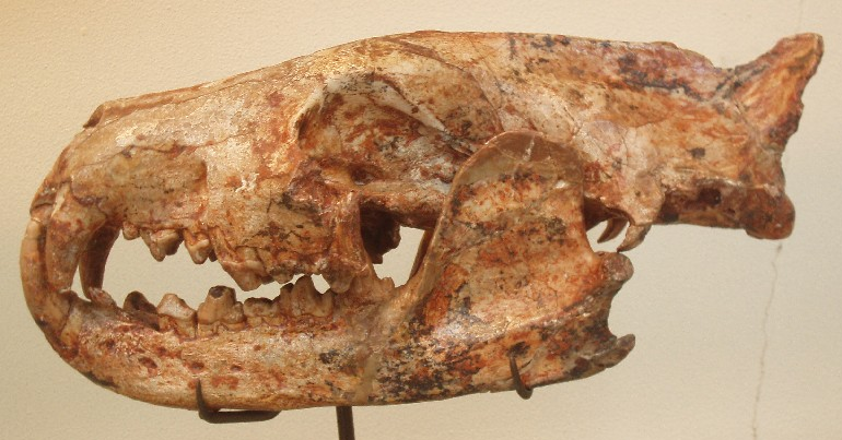 Cynohyaenodon cayluxi skull